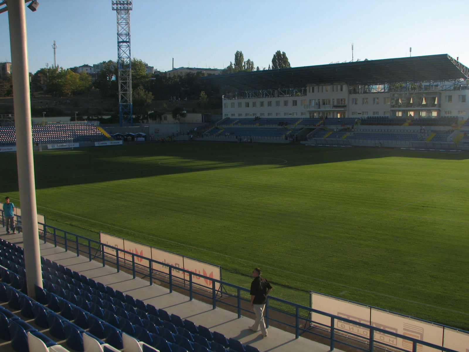 СКС_в_сентябре_2011года